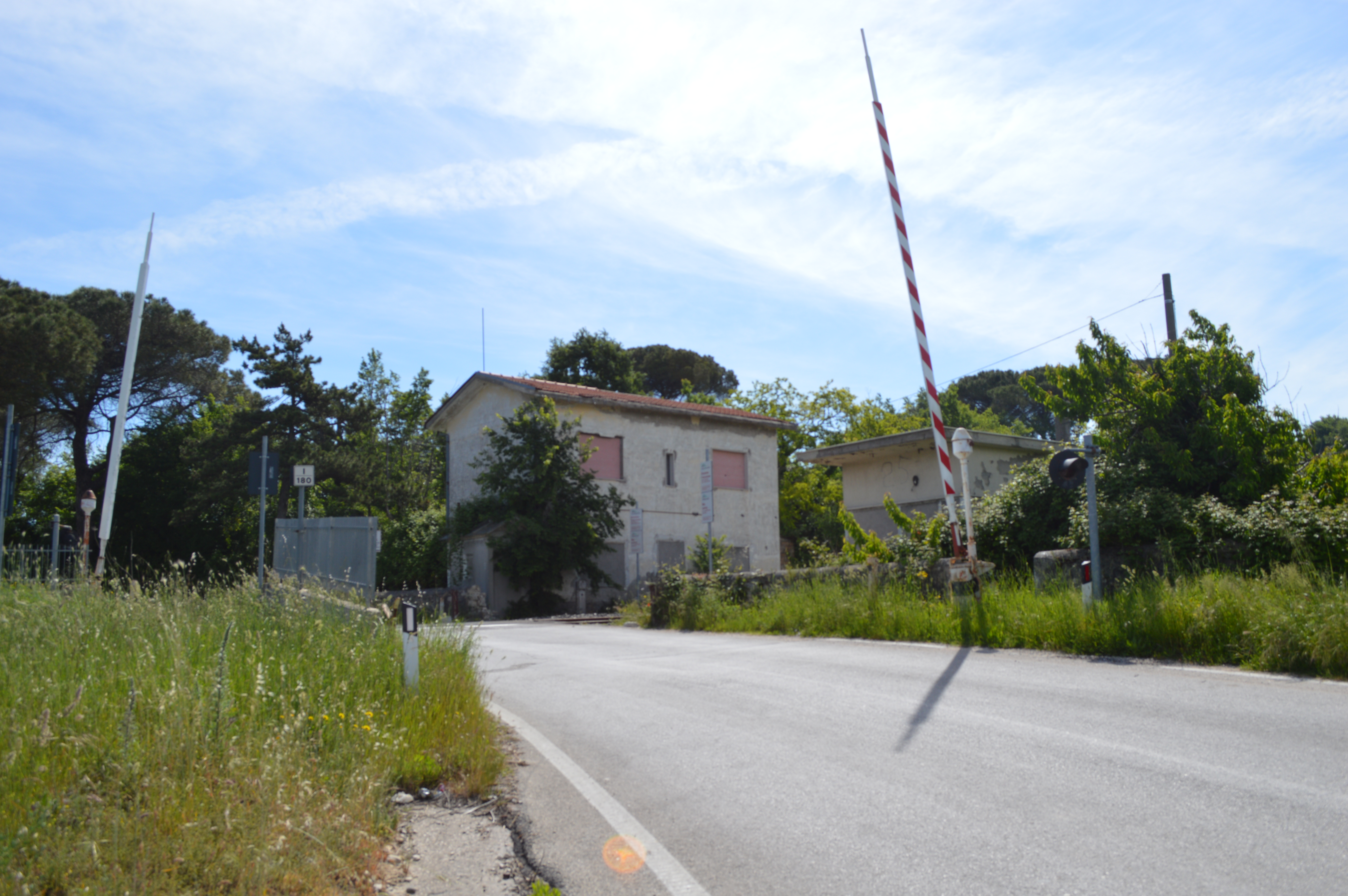 Passaggio a livello Km 50 Casacalenda PL km 50 linea Termoli-CB-Venafro nei pressi di Casacalenda dove risultava attiva in tempi andati la fermata ferroviaria di Provvidenti ( paese a circa 4km di distanza)